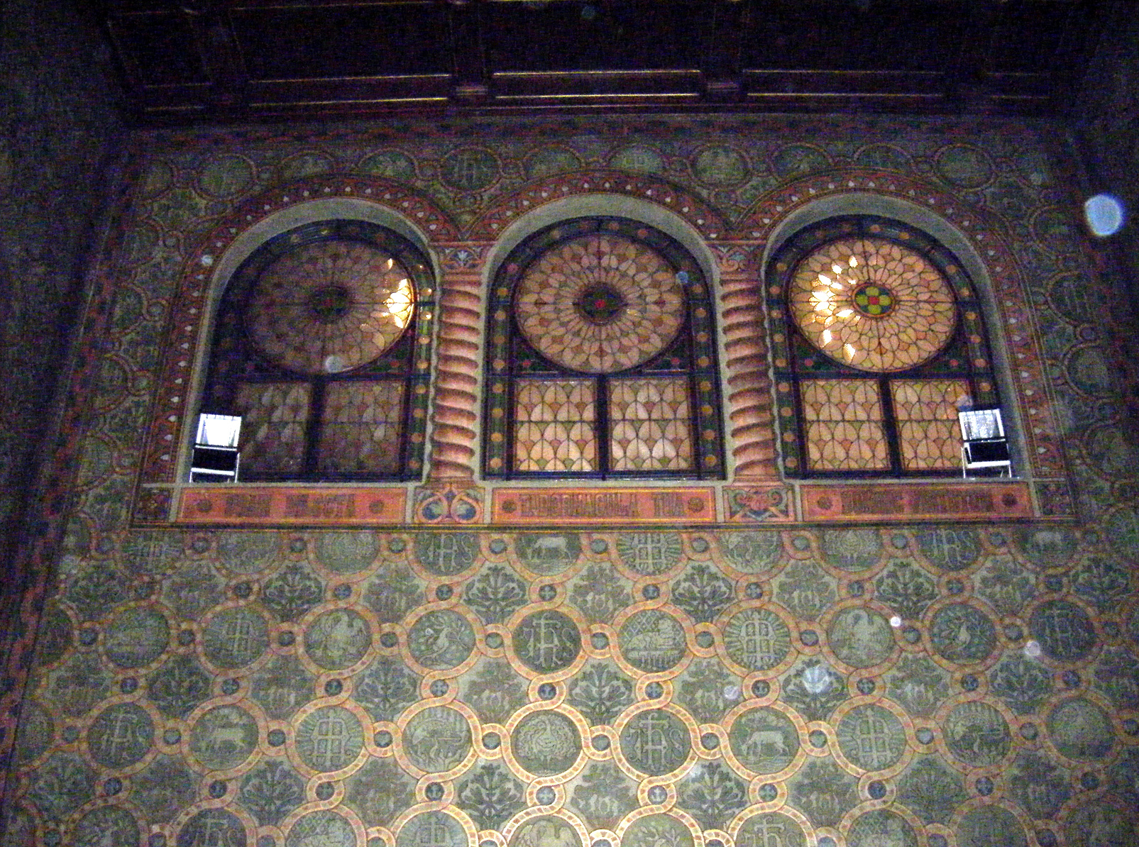 Pázmáneumi kapelle